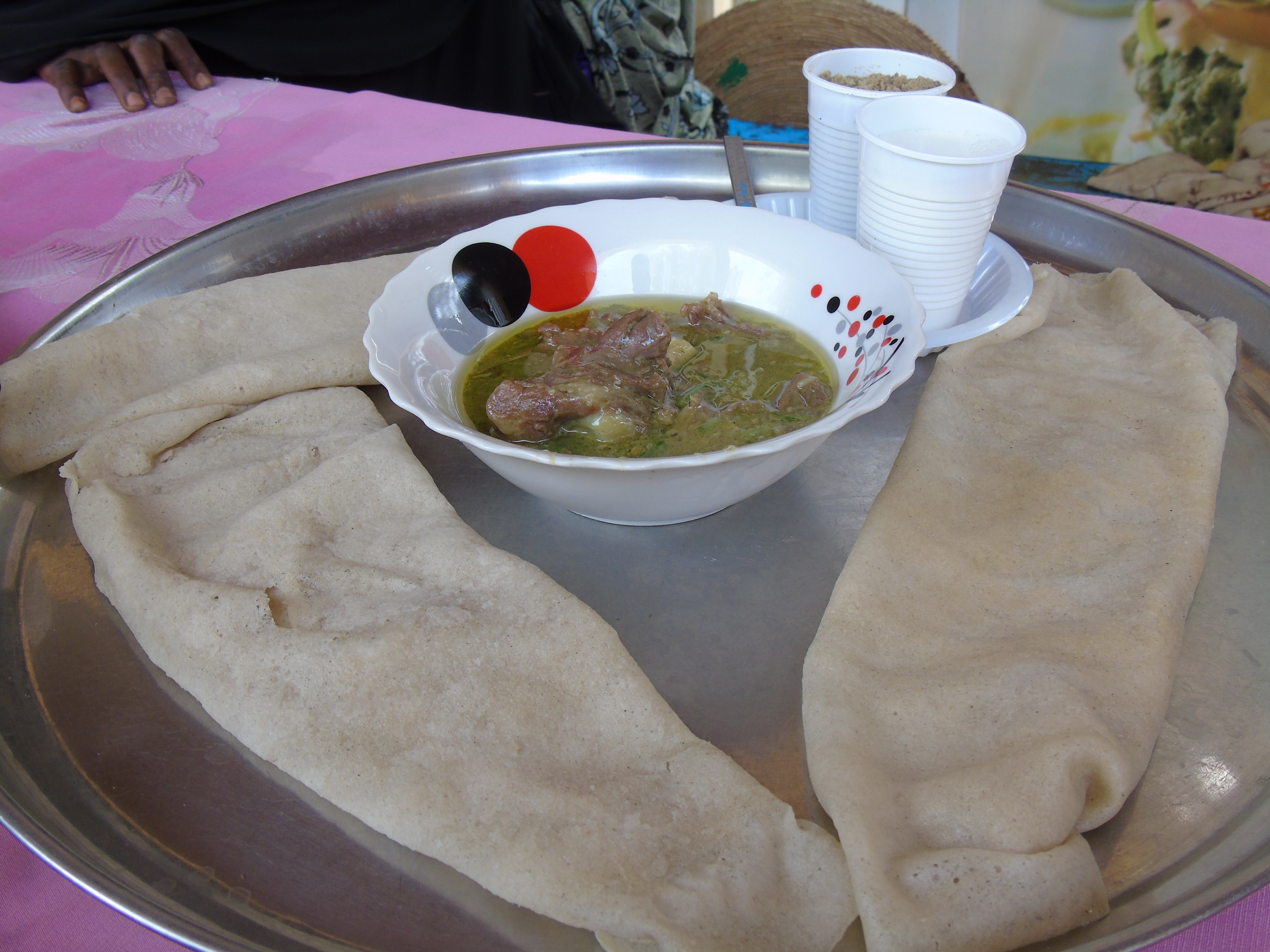 Kissar à base du mil accompagné du sauce de légume.